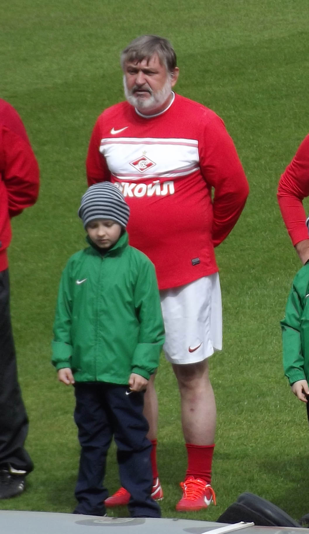 Фёдор Черенков на матче в честь 100-летия футбола в Томске